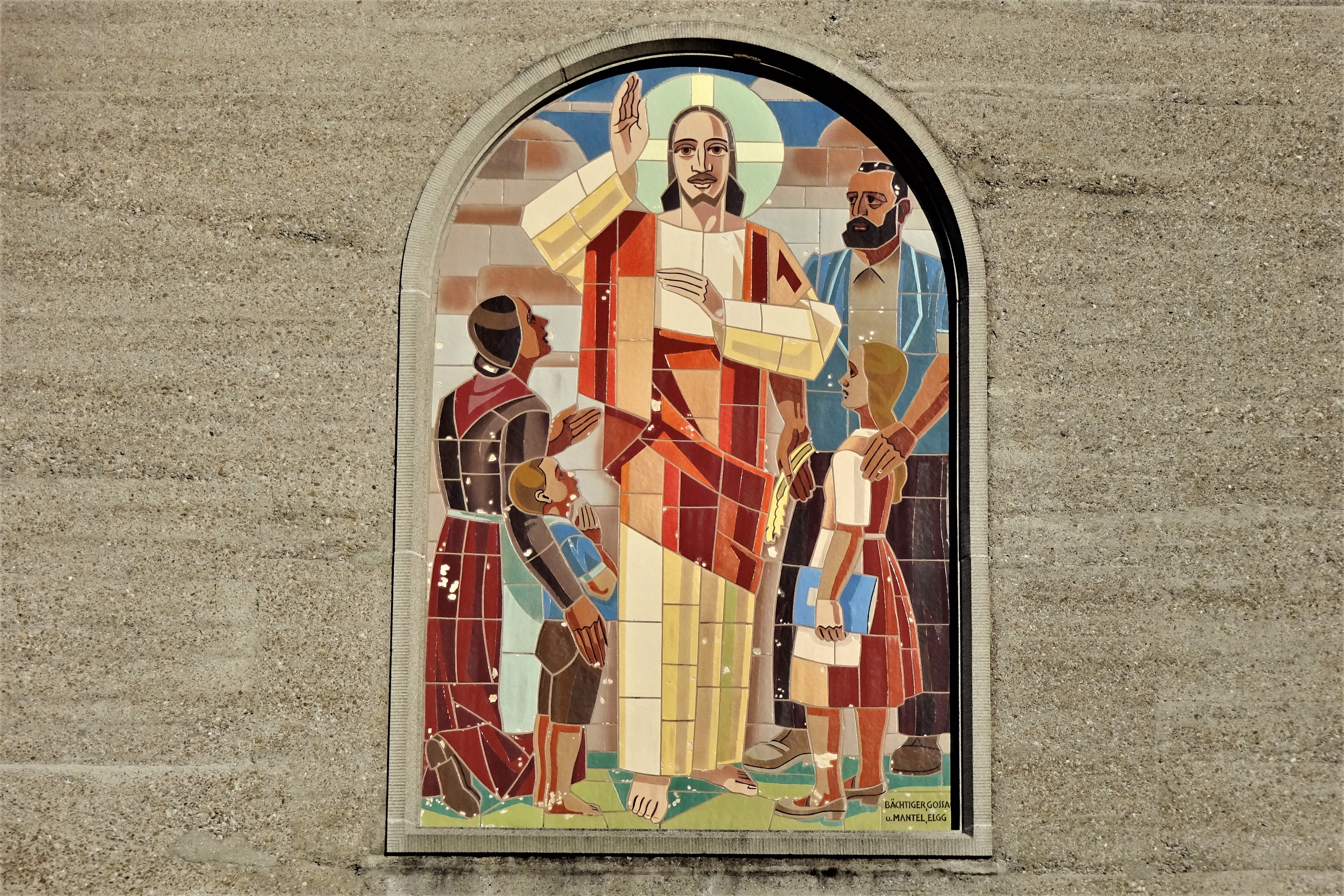 Wünnewil-Flamatt – Pfarrkirche St.Margaretha, KGS-Nr 13364 (Augustin Genoud-Eggis, 1932): Keramikmosaik «Christus segnet die Familie» (Augustin Meinrad Bächtiger, 1937) an der Hauptfassade (Westfassade) über dem Hauptportal